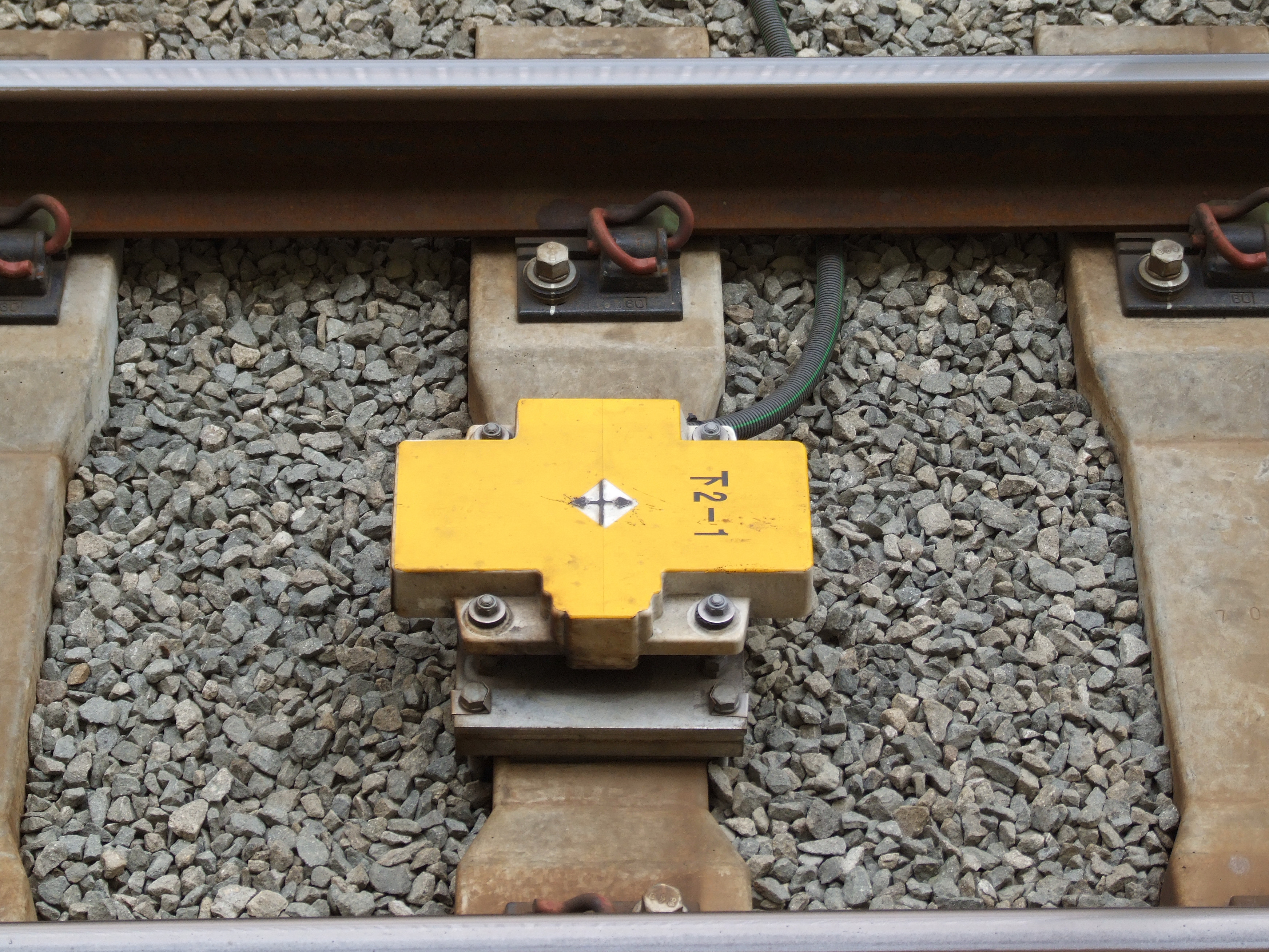 ATS-P地上子（ホームから撮影）